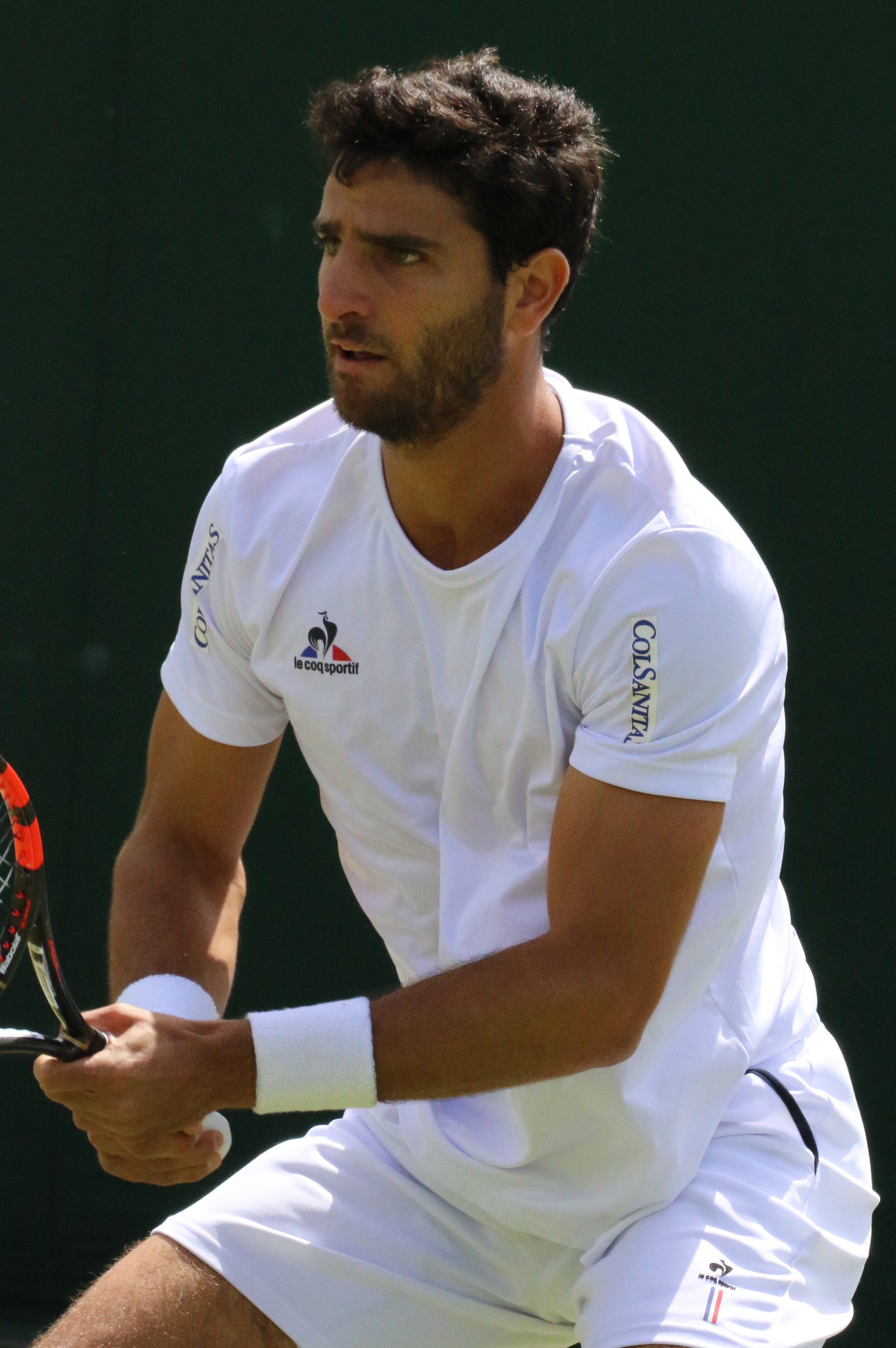 Farah WM16 (8)